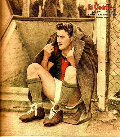 René Pontoni, Jugador del Club Atlético San Lorenzo de Almagro.